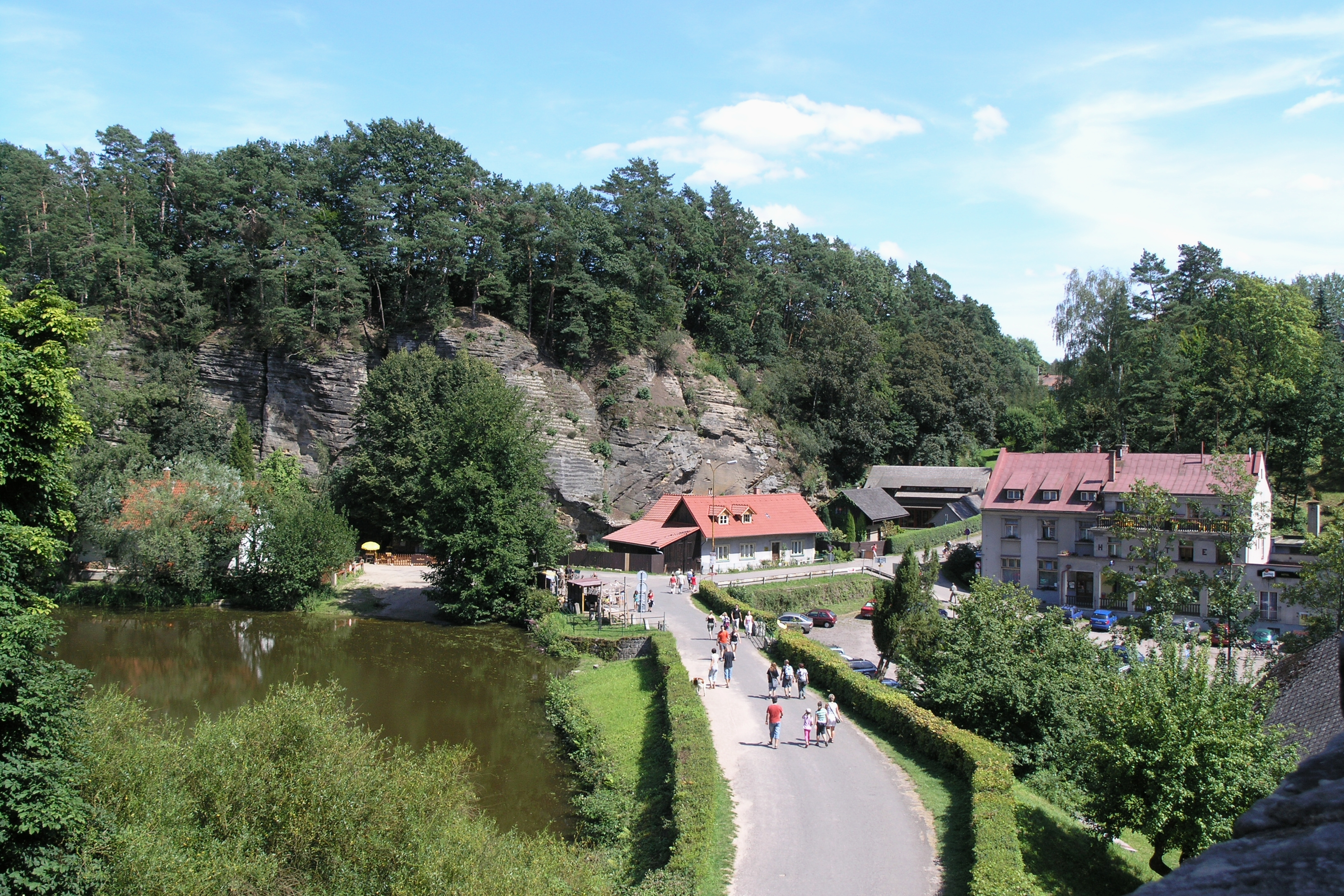 Podkost - pohled od hradu Kost přes Bílý rybník